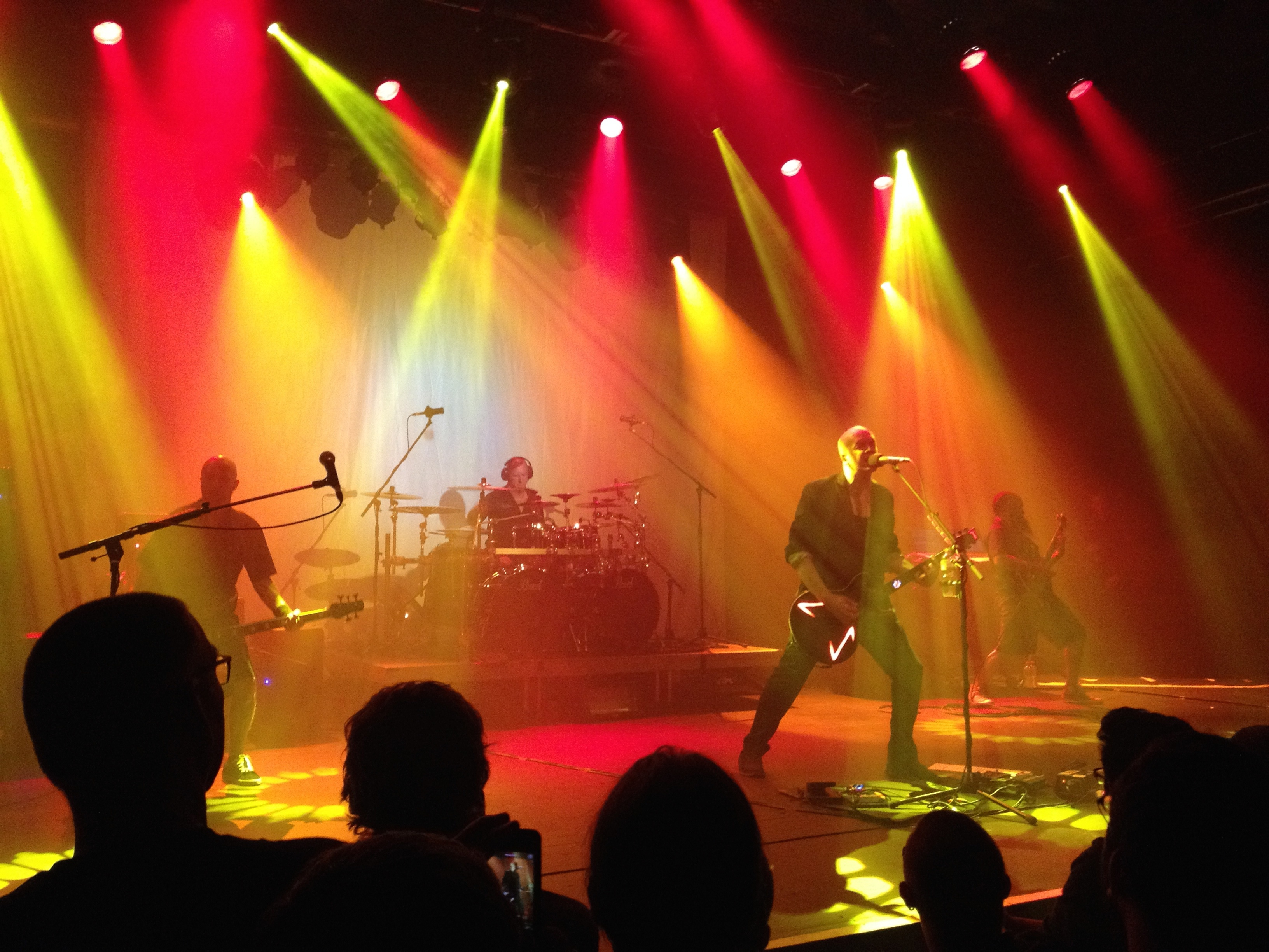 The Devin Townsend Project live.